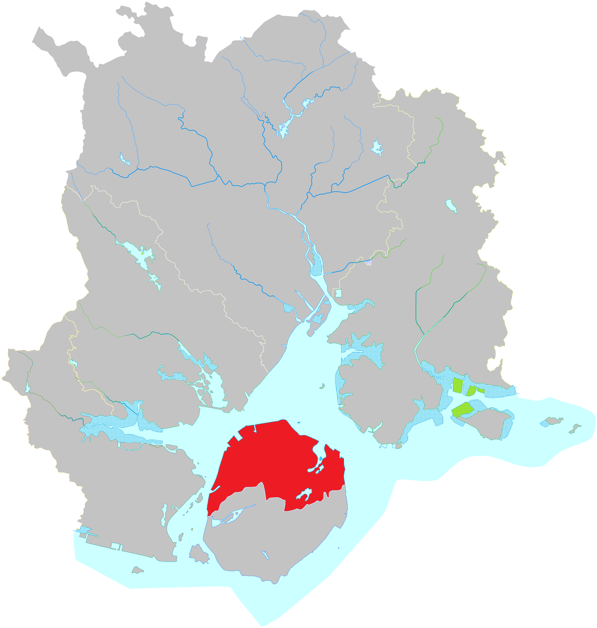 Huli, Xiamen-China mapa